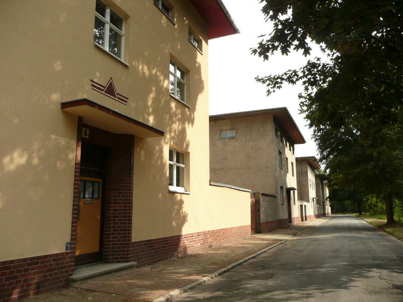 Siedlung"Jerusalem",Forst (Niederlausitz), Strasse: An der Malxe, Architekt: Rudolf Kühn